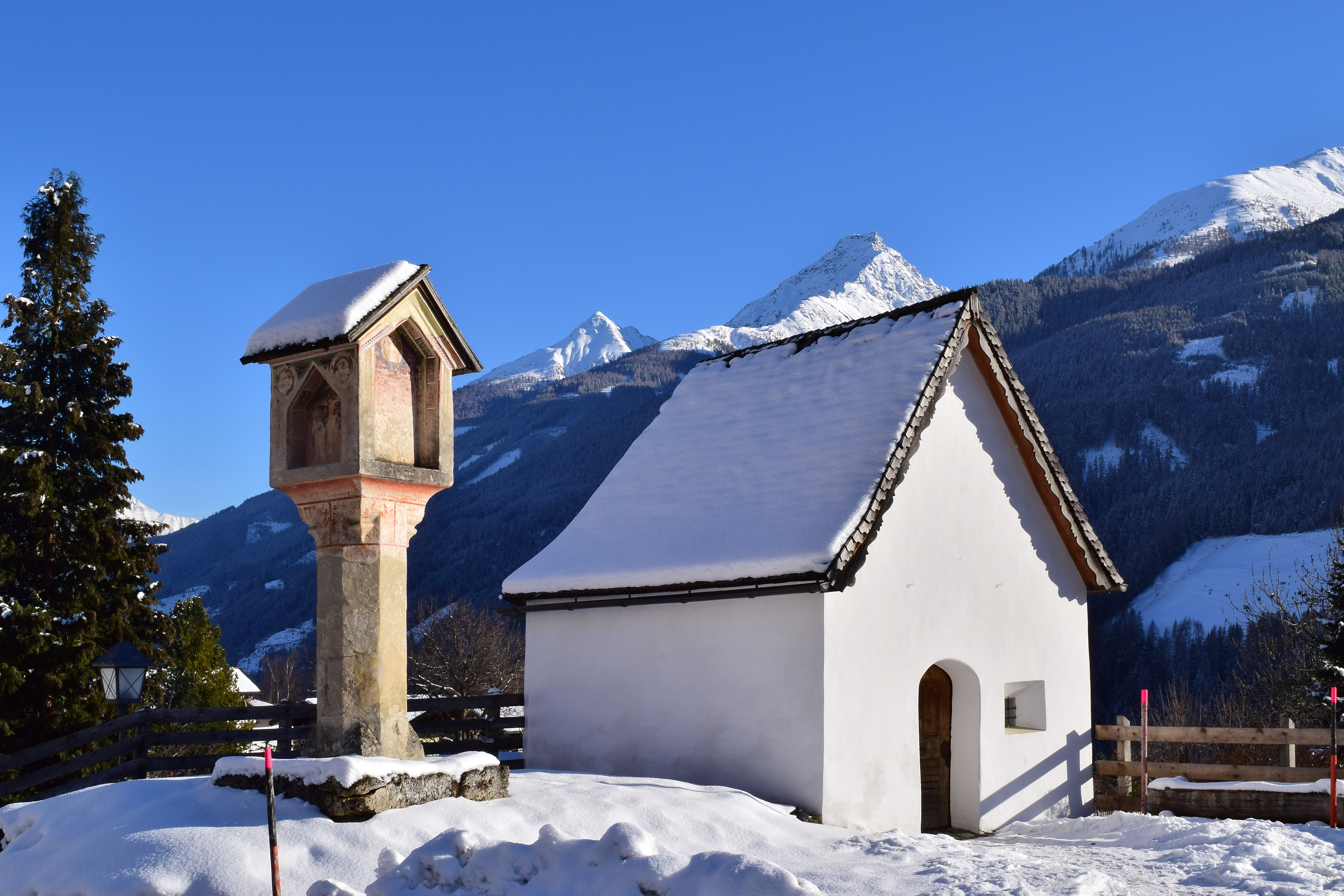 Die Antoniuskapelle in Virgen wurde im 17. Jahrhundert, der Bildstock Mitte des 15. Jahrhunderts errichtet. Im Hintergrund Kleiner und Großer Zunig.